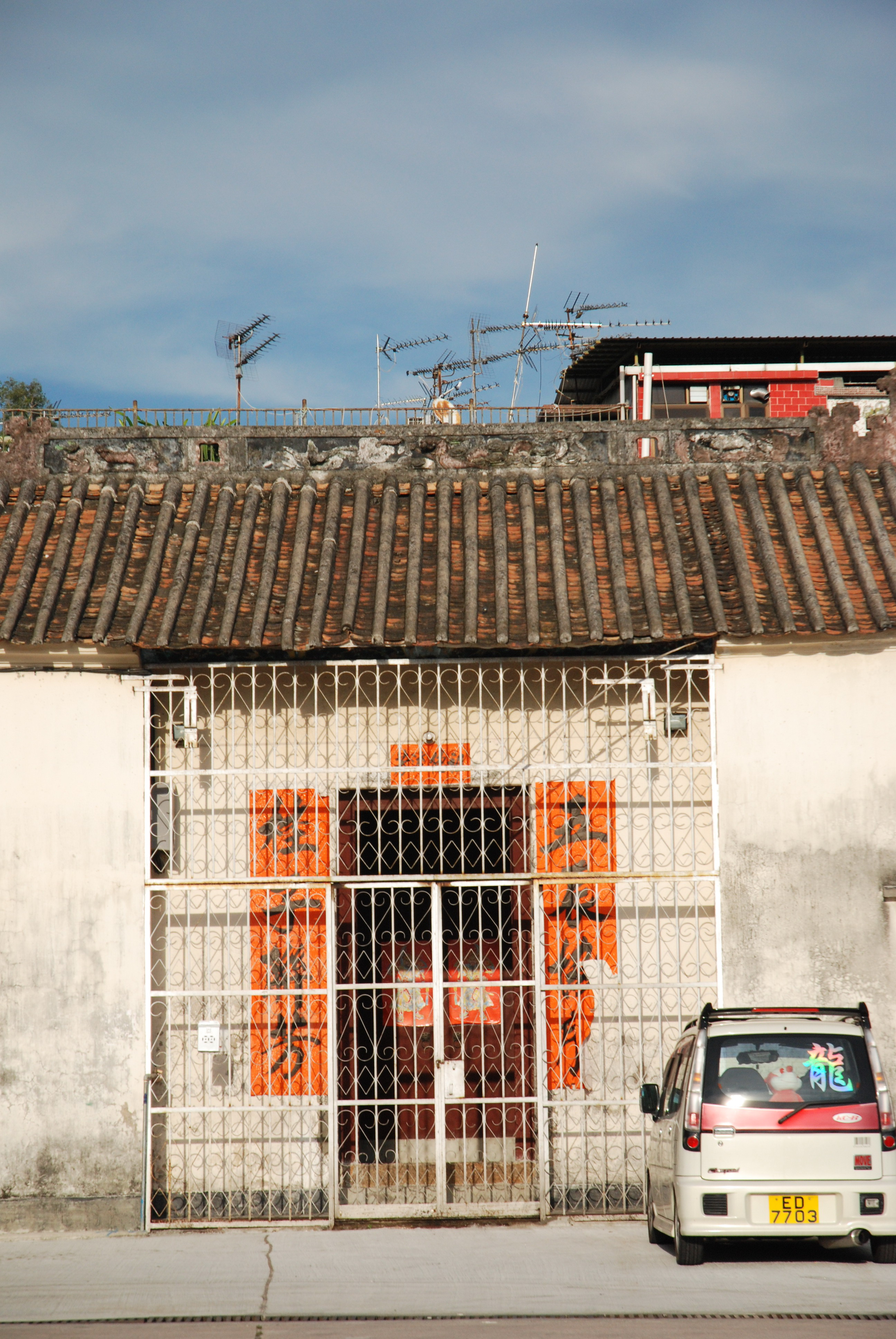 中文（香港）: 屏山文物徑五桂堂。